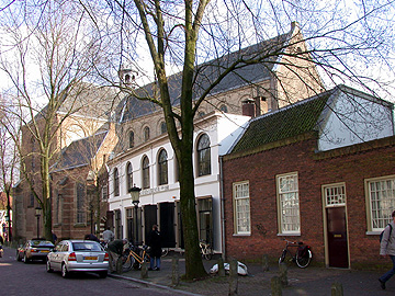 Pieterskerk, Utrecht